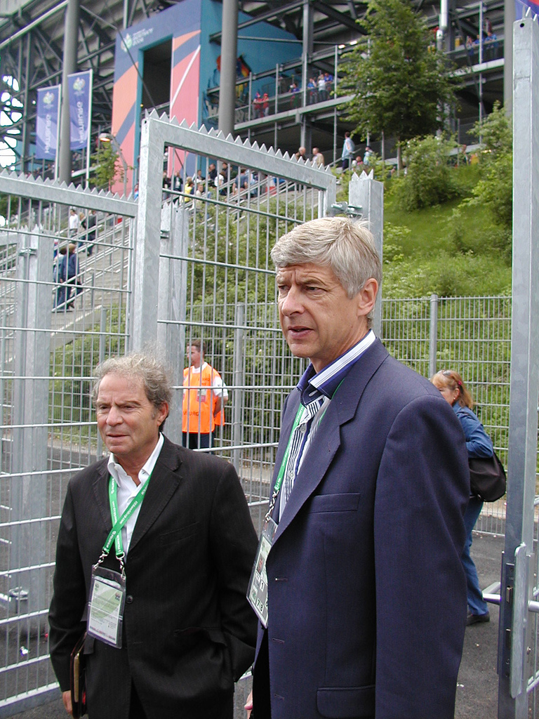 Arsene Wenger visiting Hamburg